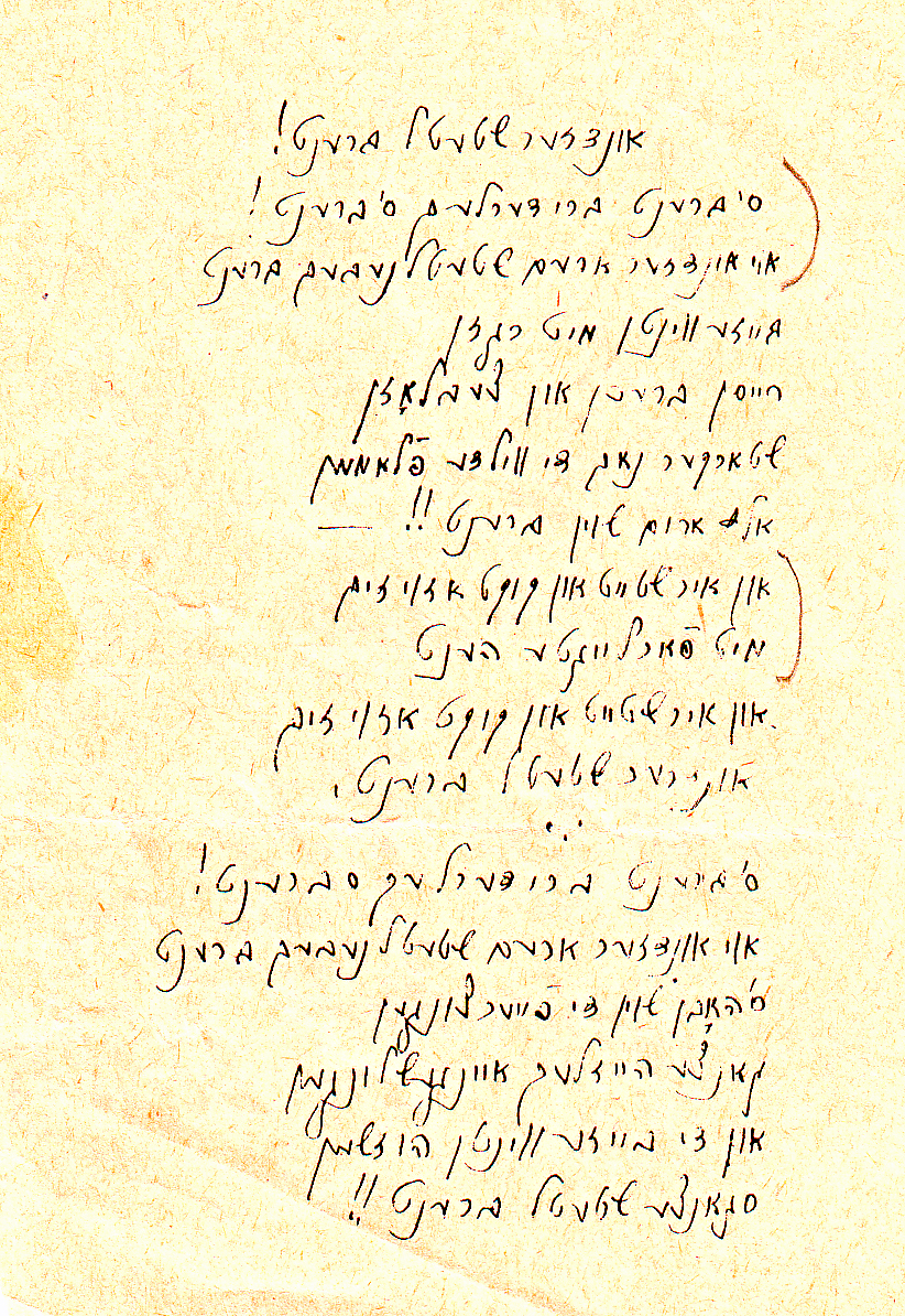 כתב יד של "העיירה בוערת" מאת מרדכי גבירטיג